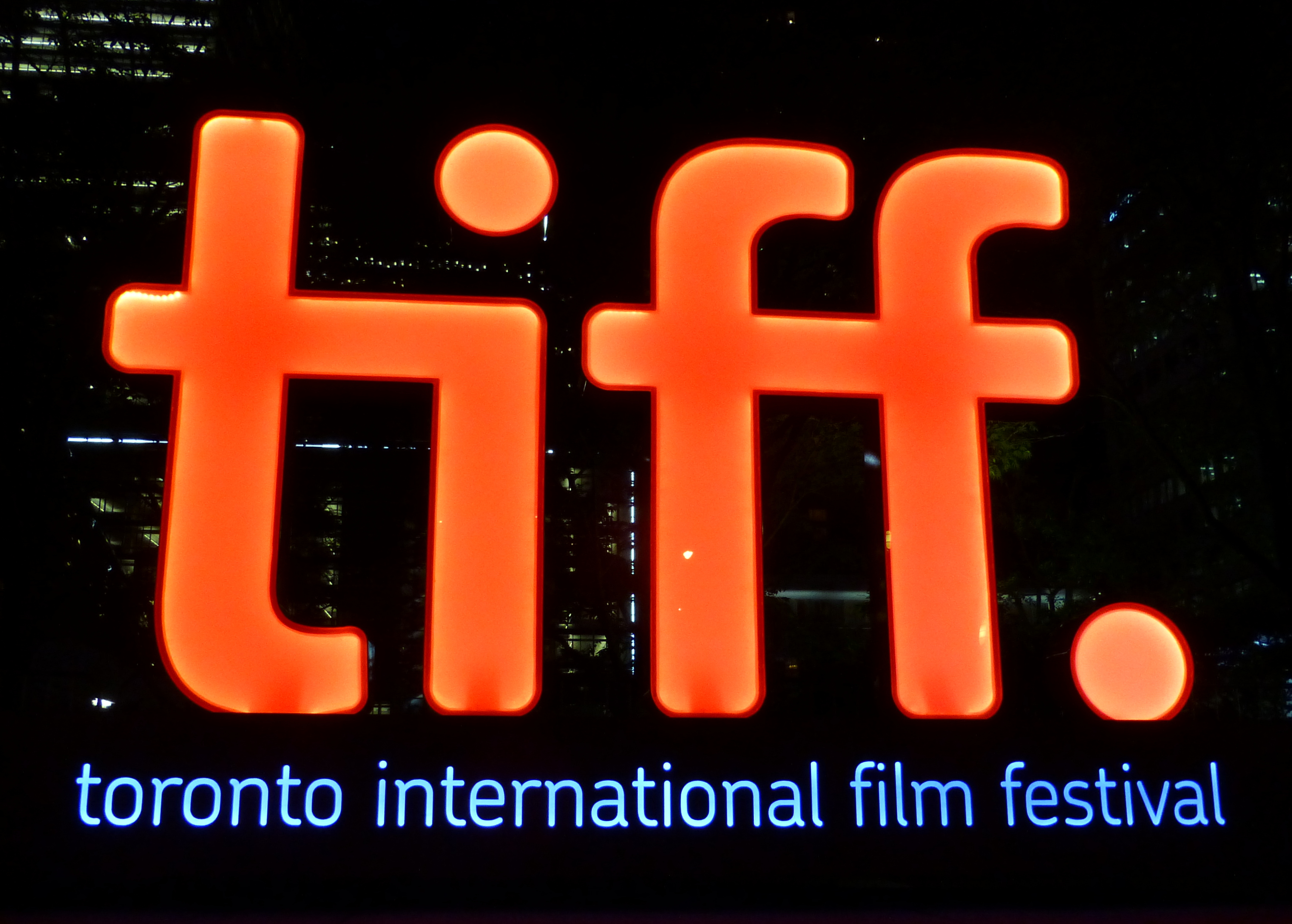 Nice Signage